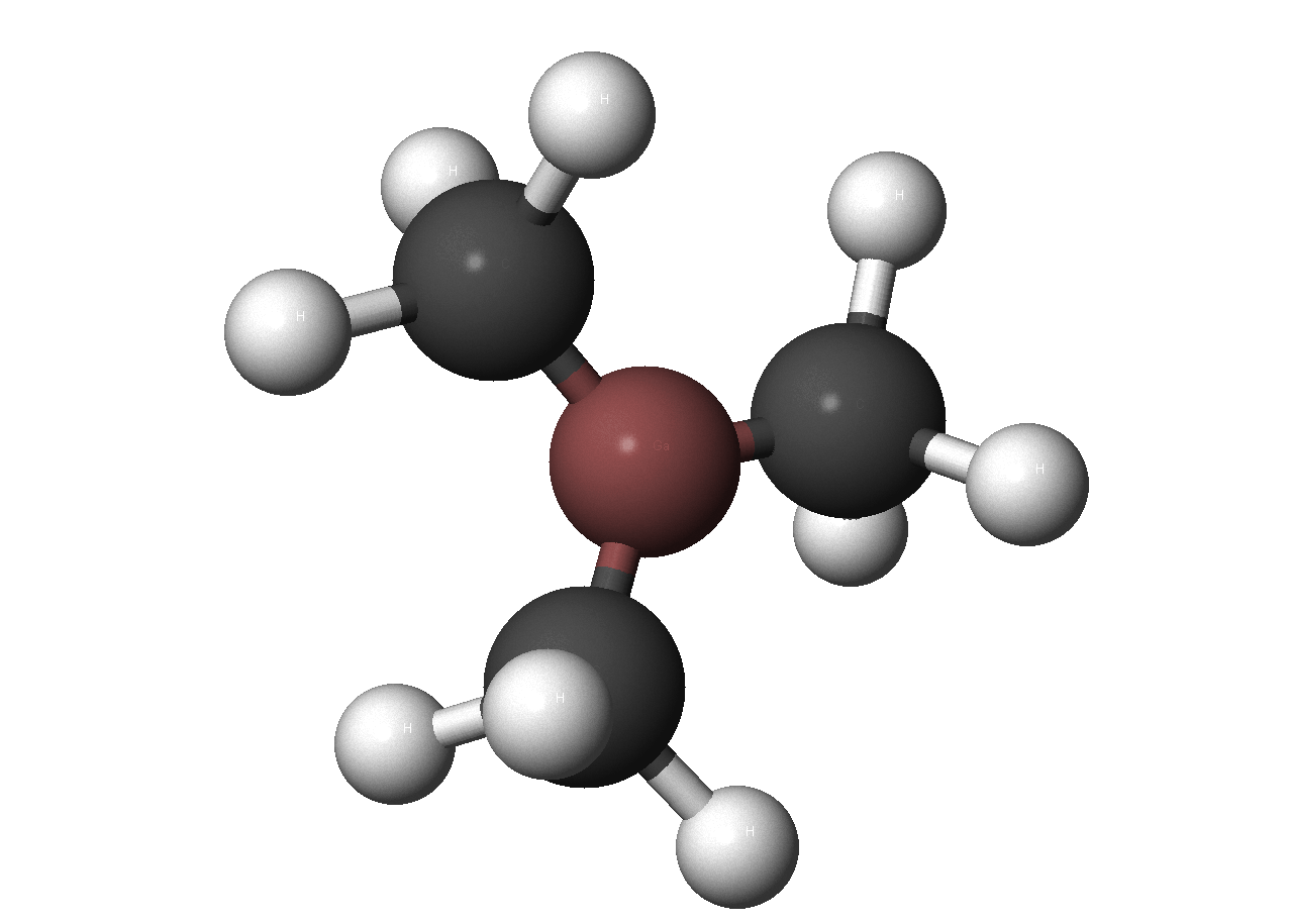 Structure du triméthylgallium. Créé avec Ghemical, Jmol et The Gimp.